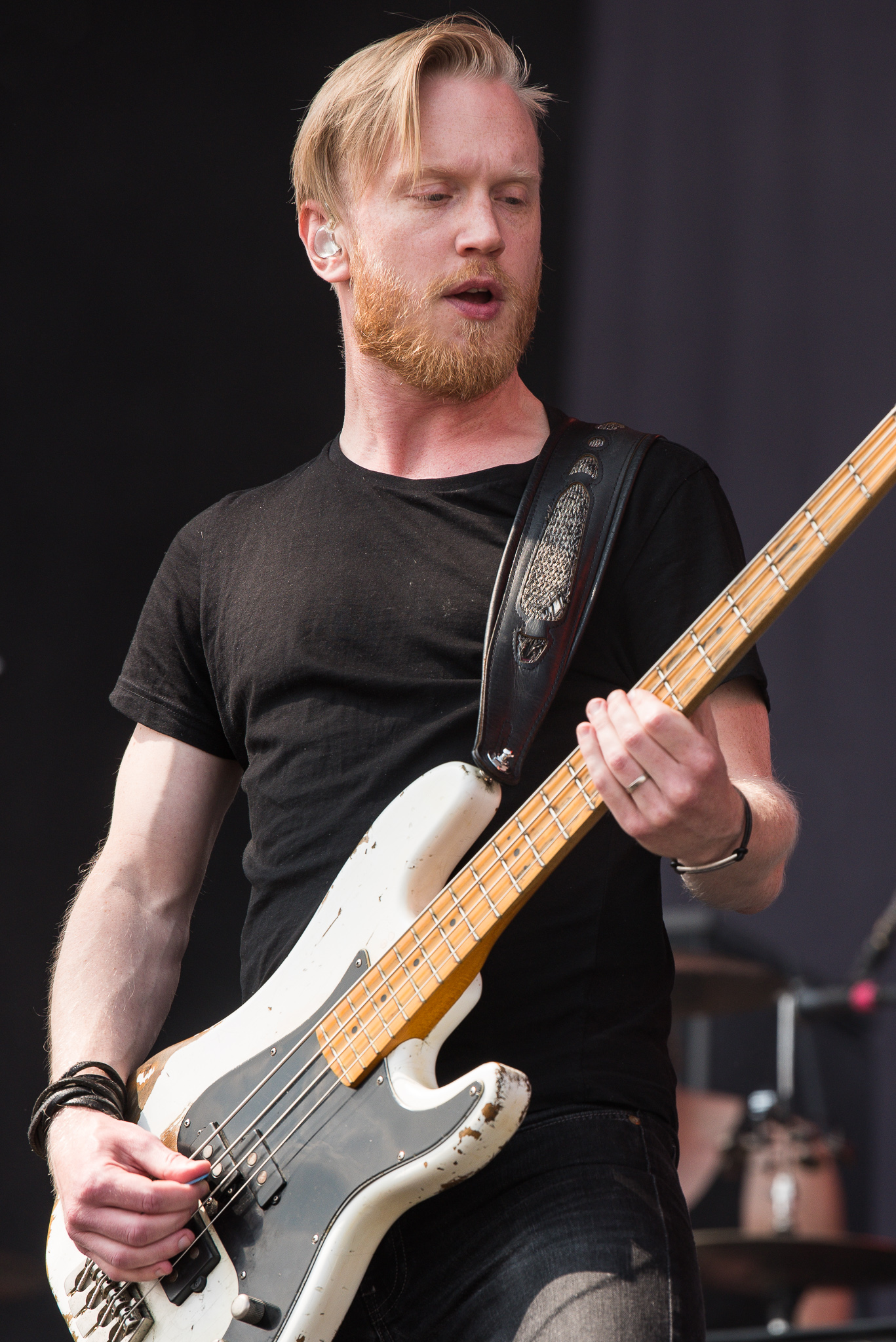 ARGO-Konzerte,Festival,Jonas Almén,Konzert,Livekonzert,Livemusik,Musik,RiP,Rock im Park 2015,Royal Republic,Seat Zeppelin Stage